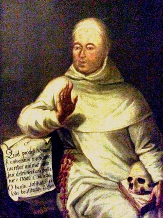 Portrét Kardinála Augusta, milovníka samoty a ticha, v habite pavlínskeho rádu